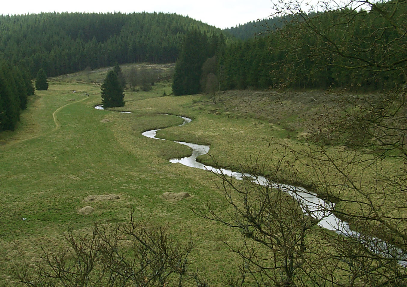 Oberer Perlenbach (Schwalmbach), Truppenübungsplatz Elsenborn, Belgien